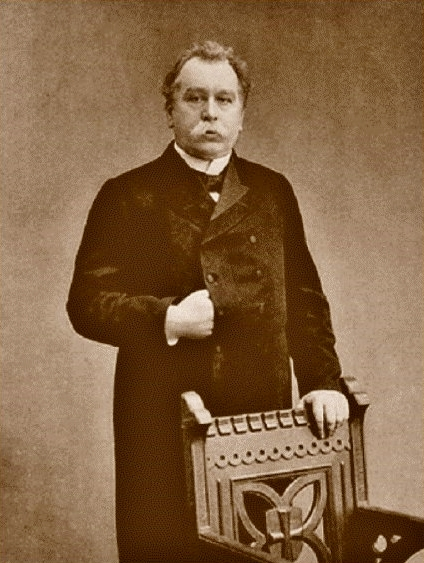 Vjačeslav Konstantinovič von Pleve